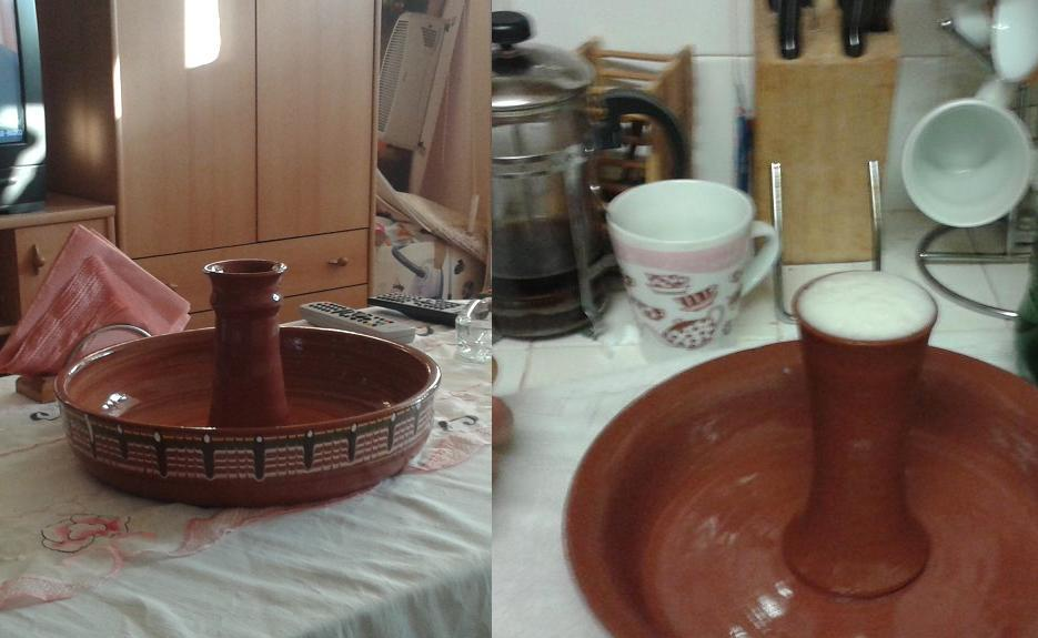 Γιουβέτσι πουλερικών χωρίς & με μπύρα